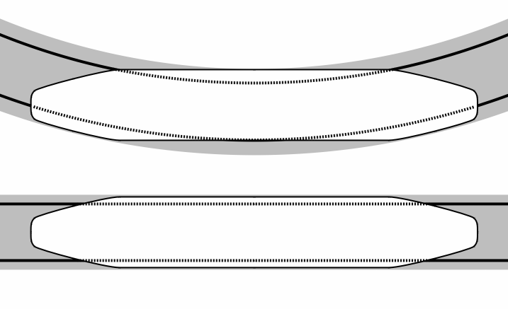 Schemazeichnung für die Bauform eines Hechtwagens und des Lichtraumprofils